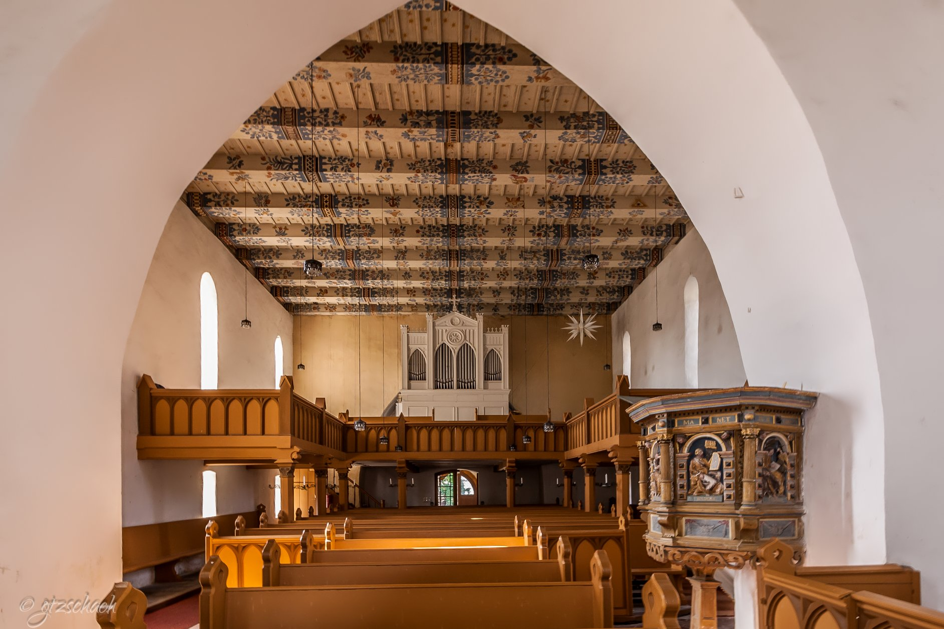 Dorkirche Briest - Empore und die Orgel von 1876